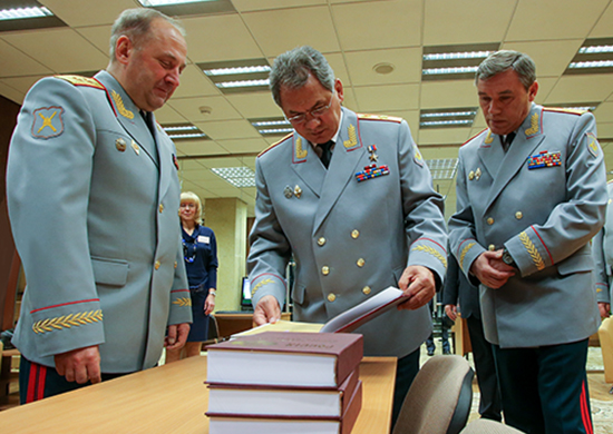 Министр обороны России генерал армии Сергей Шойгу в Главном разведывательном управлении Генерального штаба Вооруженных Сил в День военного разведчика